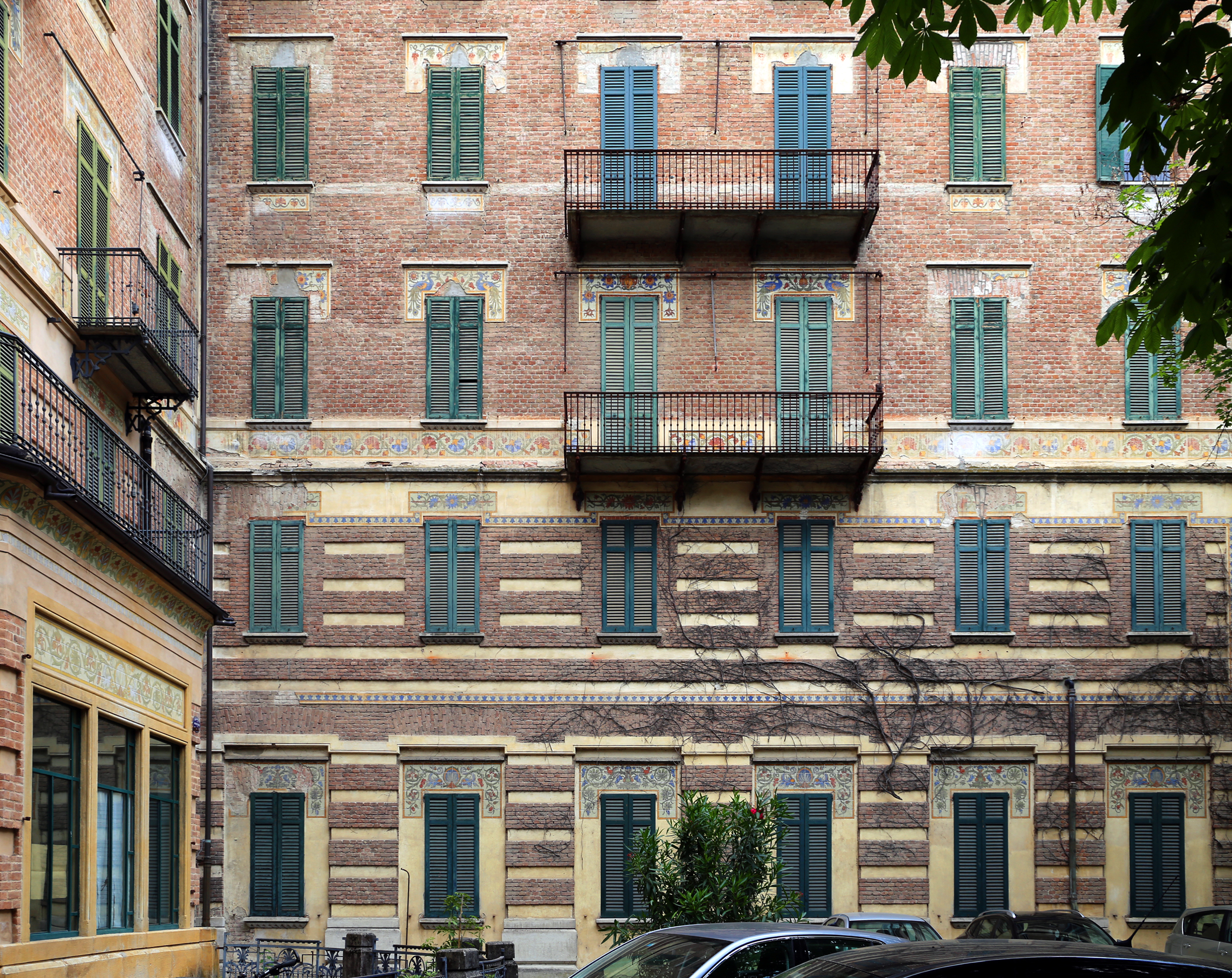 Palazzo dei Congressi (Salsomaggiore Terme) This is a photo of a monument which is part of cultural heritage of Italy.